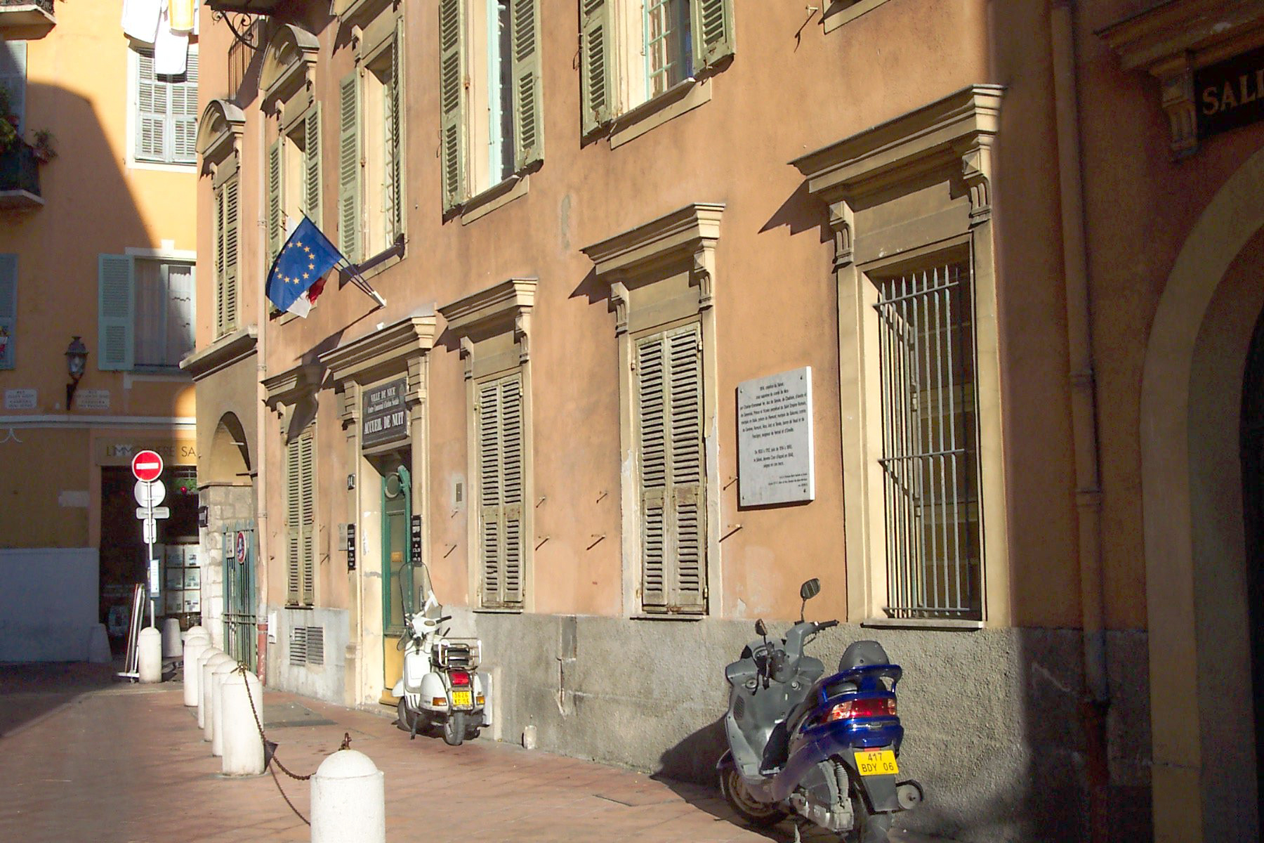 Česky: Historické jádro města Nice, Francie